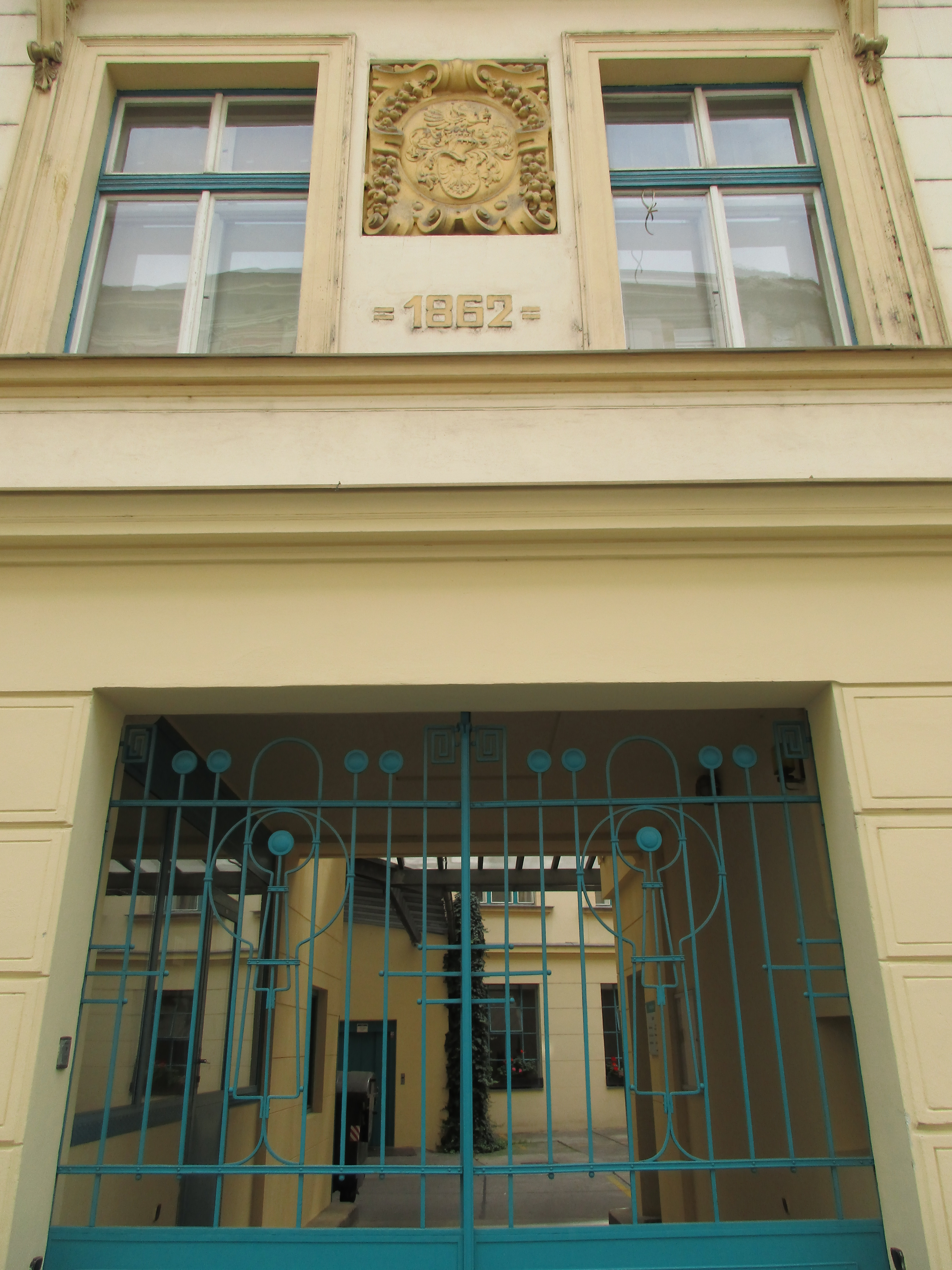 Dr. Eduard Grégr a syn, knihtiskárna v Praze, Hálkova 2 - V Tůních 4, Praha 2 - Nové Město